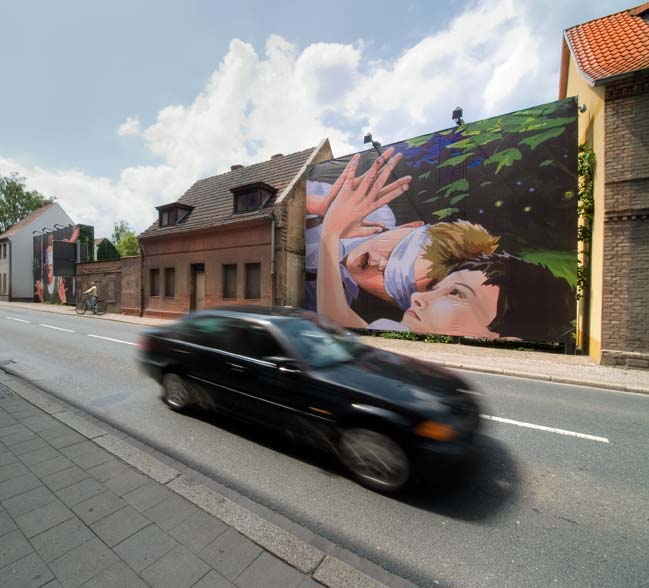 Drive-Thru-Gallery in Aschersleben Auch wenn diese Datei unter einer freien Lizenz steht oder nicht urheberrechtlich geschützt ist, kann ihre Verwendung und/oder Veränderung gegebenenfalls durch andere rechtliche Bestimmungen außerhalb des Urheberrechts eingeschränkt sein.